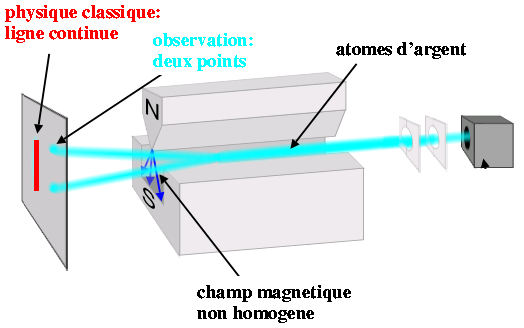 Original sous GFDL. Modifications (= traduction de texte) de Régis Lachaume.